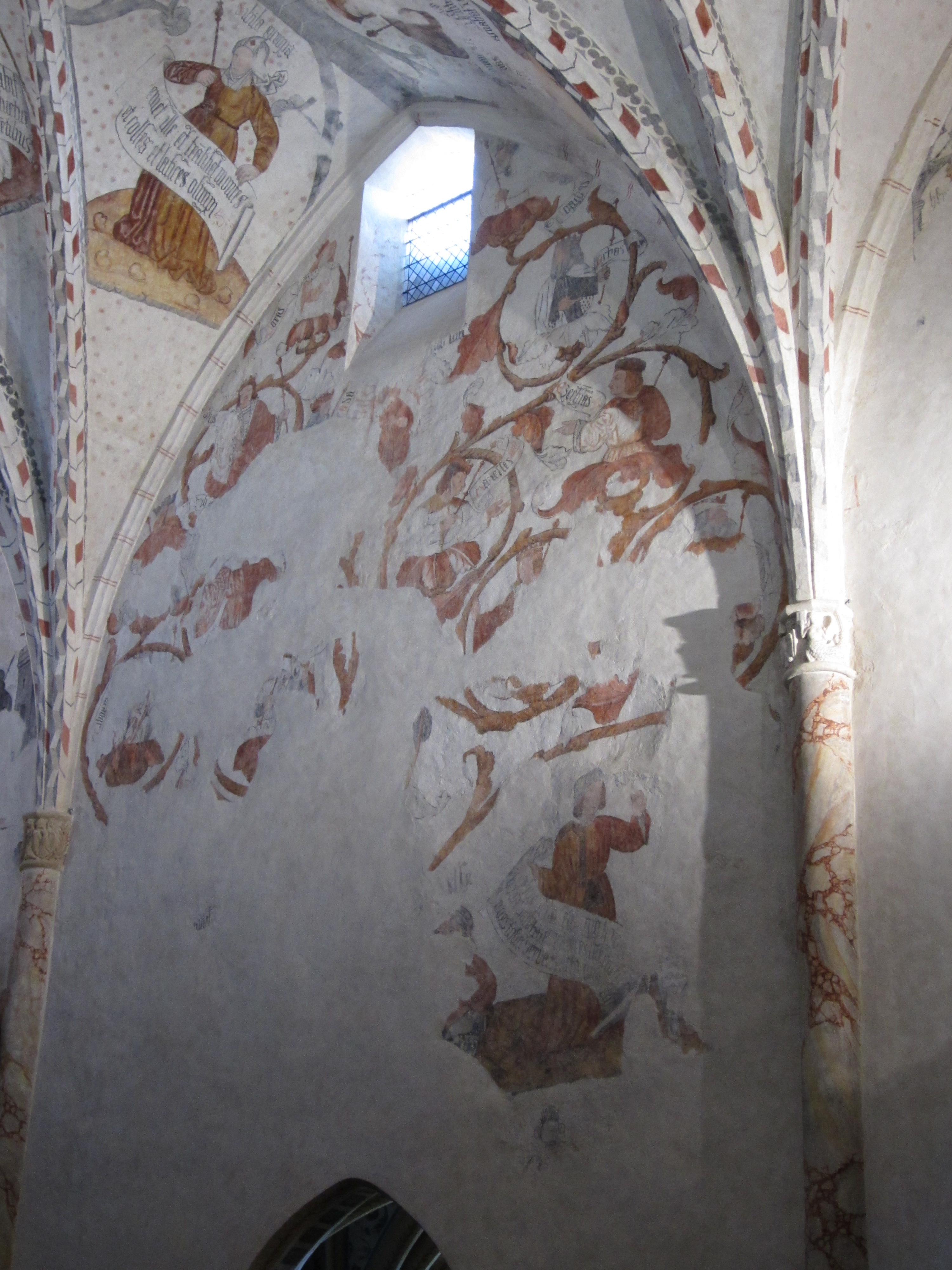 Peinture murale dans la cathédrale Notre-Dame-de-la-Sède : arbre de Jessé.